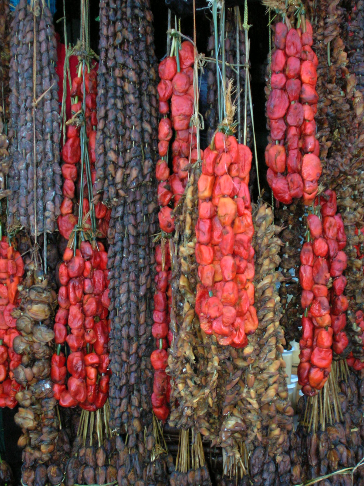 Angelmo, Cuelgas de Mariscos y Choritos Ahumados - Chile